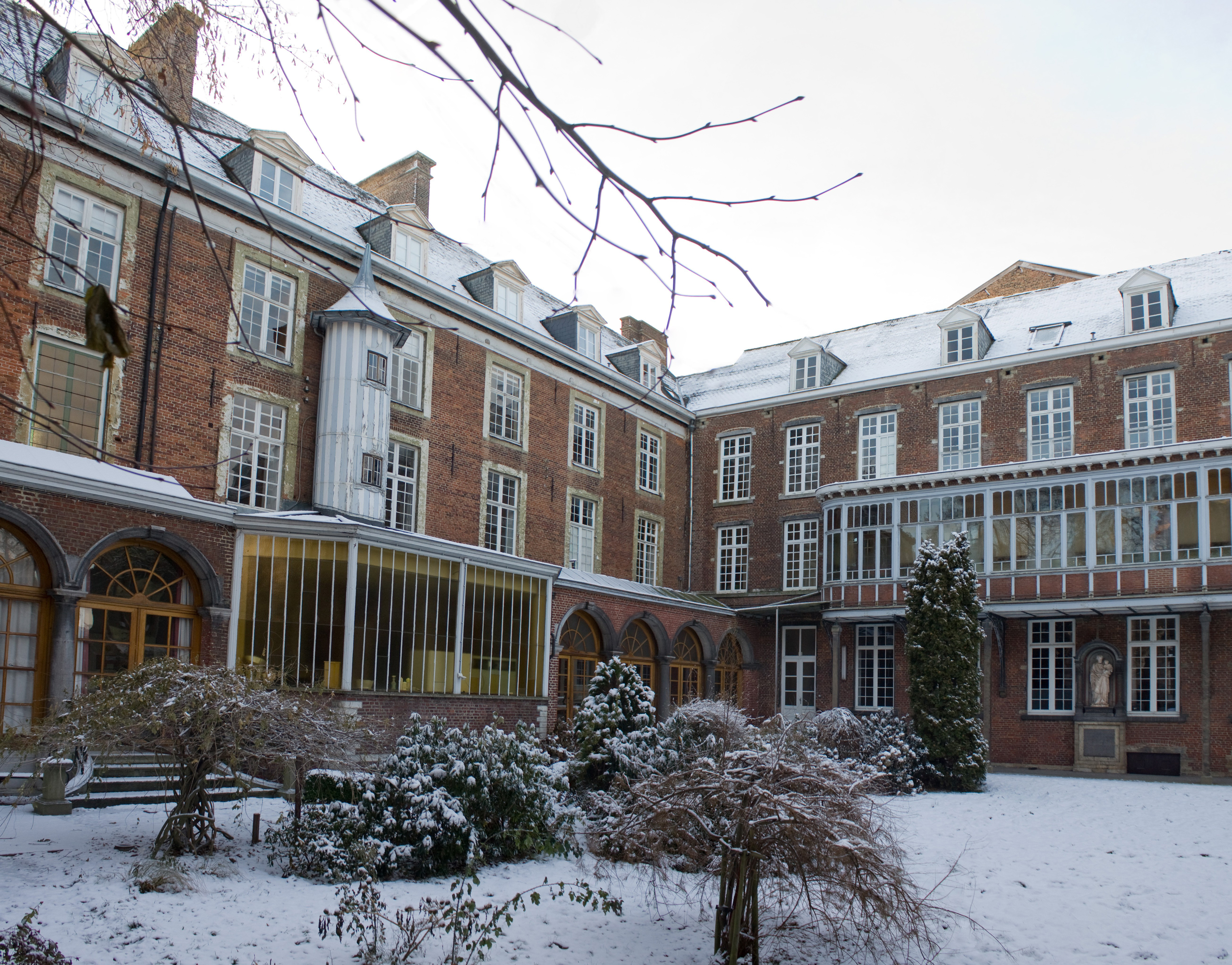 Het Hollands College (nu Paridaens-instituut) te Leuven